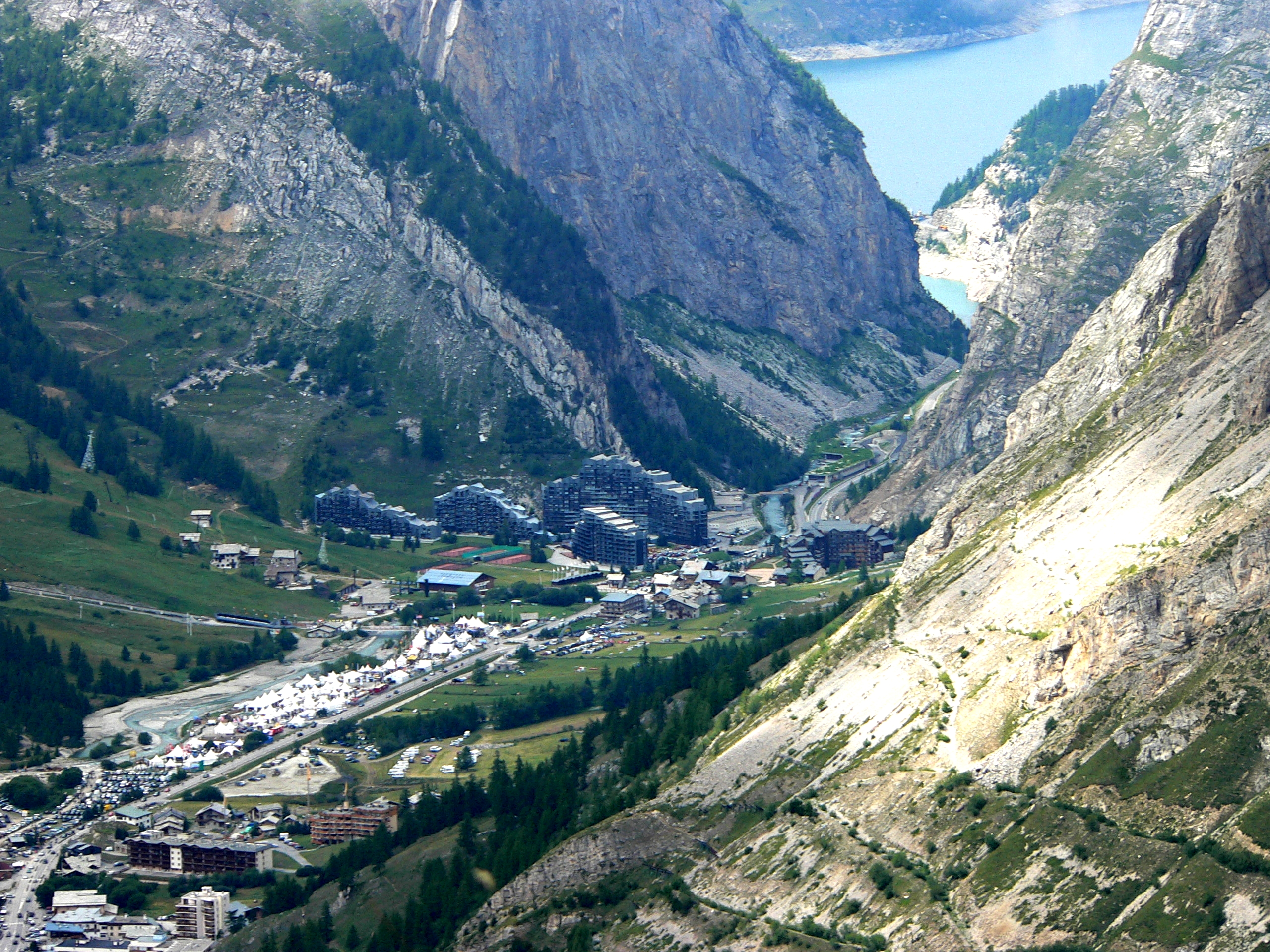 La Daille, Val d'Isère, Savoy, French Alps Au fond de la vallée le lac du Chevril